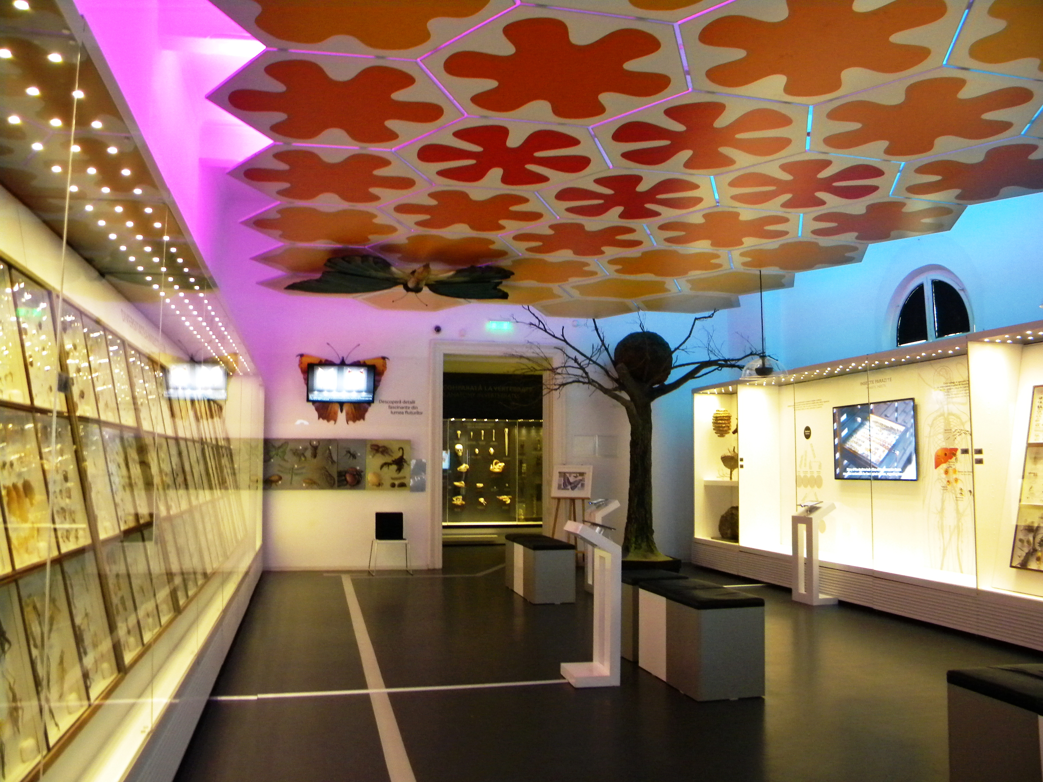 Bucuresti, Romania, Muzeul National de Istorie Naturala Grigore Antipa; B-II-m-A-18983 (Interior, detaliu 53)